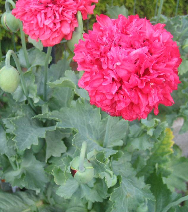 Papaver somniferum, picture taken by Tim Bekaert, Heule (Kortrijk) in the garden (July 1, 2004)